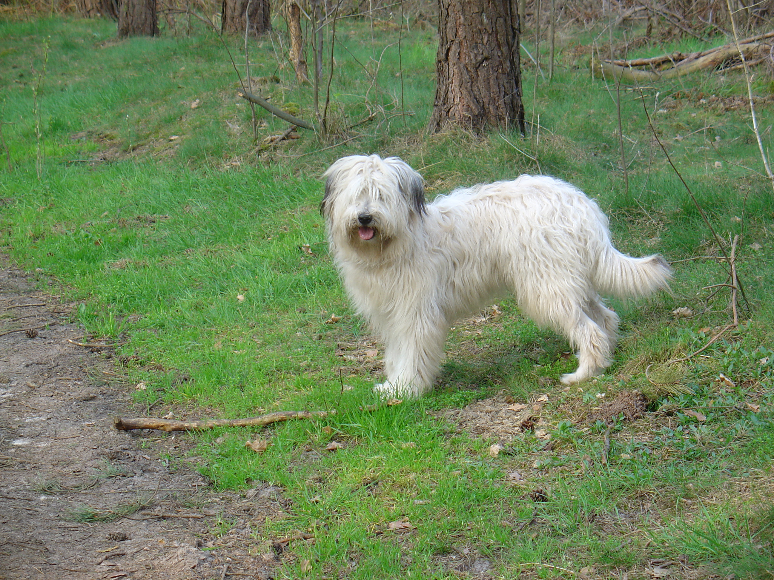 Schafpudel